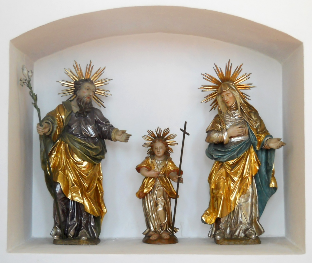 Genderkingen (Landkreis Donau-Ries), Pfarrkirche St. Peter und Paul